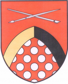 znak obce Okrouhlá (okres Česká Lípa)